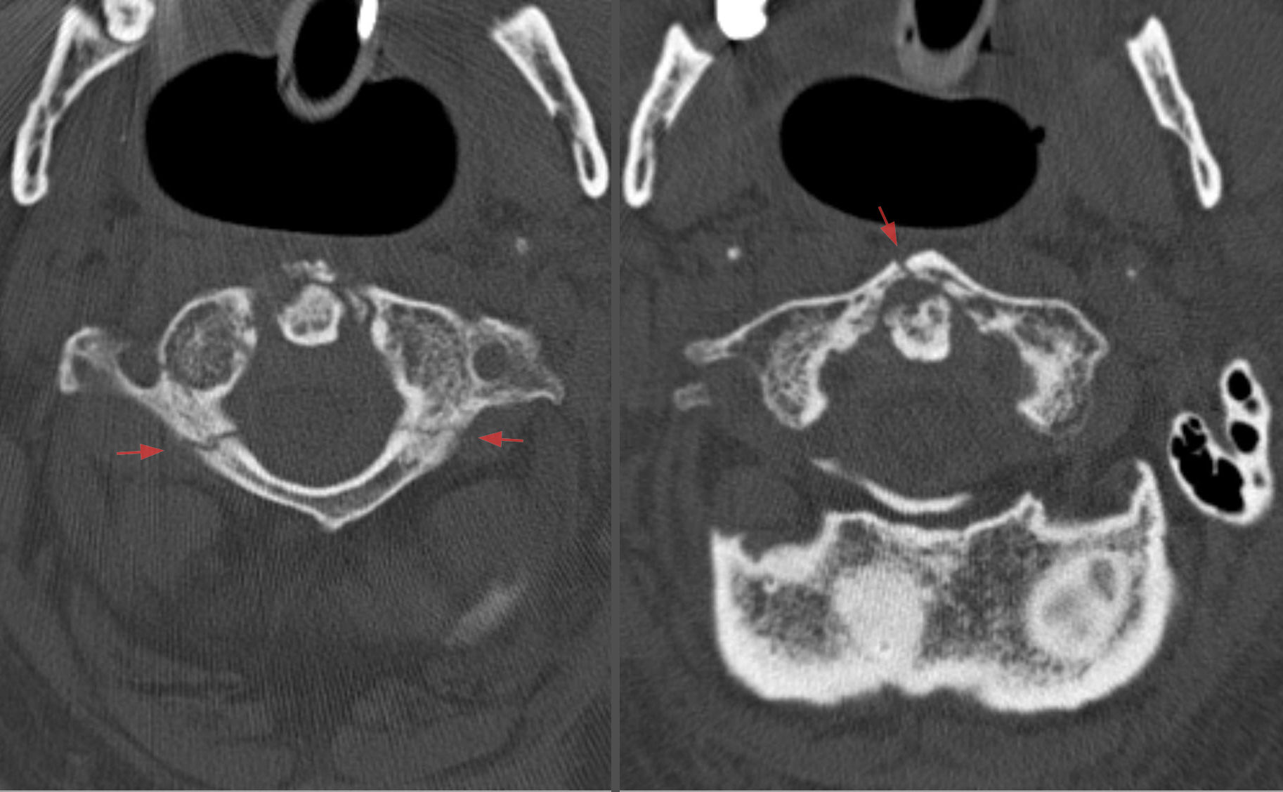 Praktisch unverschobene, mehrfache Fraktur des Atlas im Sinne einer Jefferson-Fraktur bei einem 84 Jahre alten Mann nach Sturz auf den Kopf. Man erkennt in den beiden axialen Schichten der Computertomographie die Frakturlinien ventral und beidseits lateral. Keine Verlagerung des Dens.